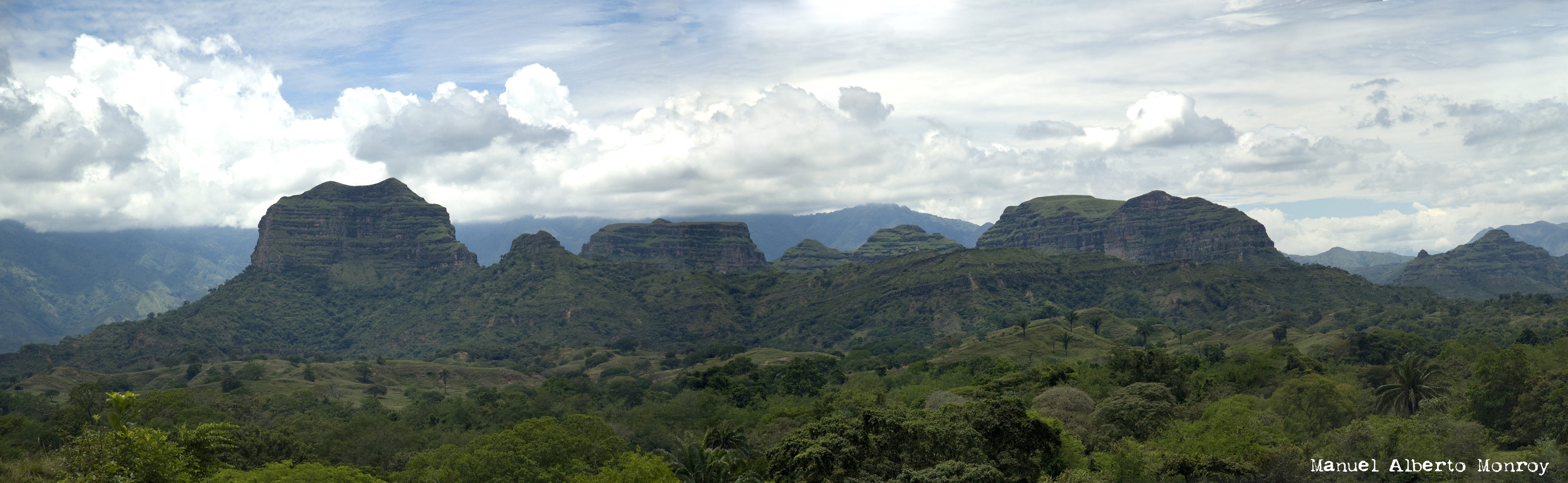 La caminata que se realizó al Parque Etno-Mitológico del Cerro de los Abechucos es la primera en la historia con tanta participación de ortegunos. Crónica a vuelo de buen cubero y con ojo de águila de uno de los caminantes que superó todos los obstáculos en una jornada que vibró, del amanecer al atardecer, con plena vitalidad.